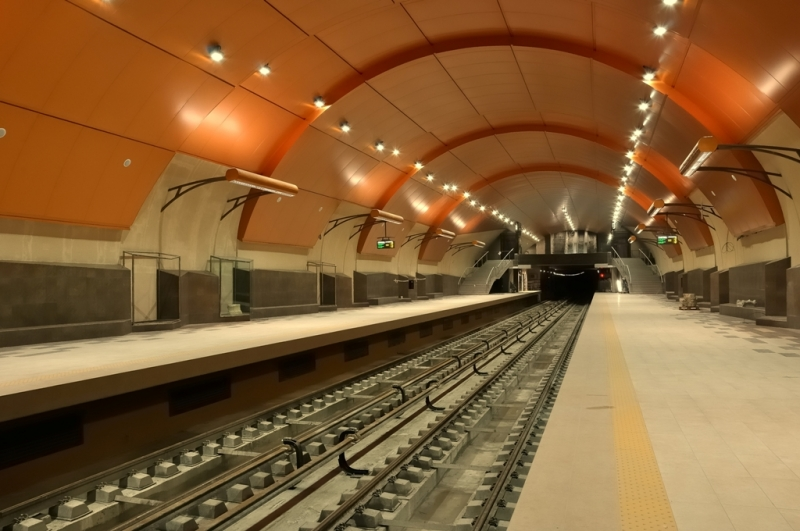 Метростанция "Сердика II"